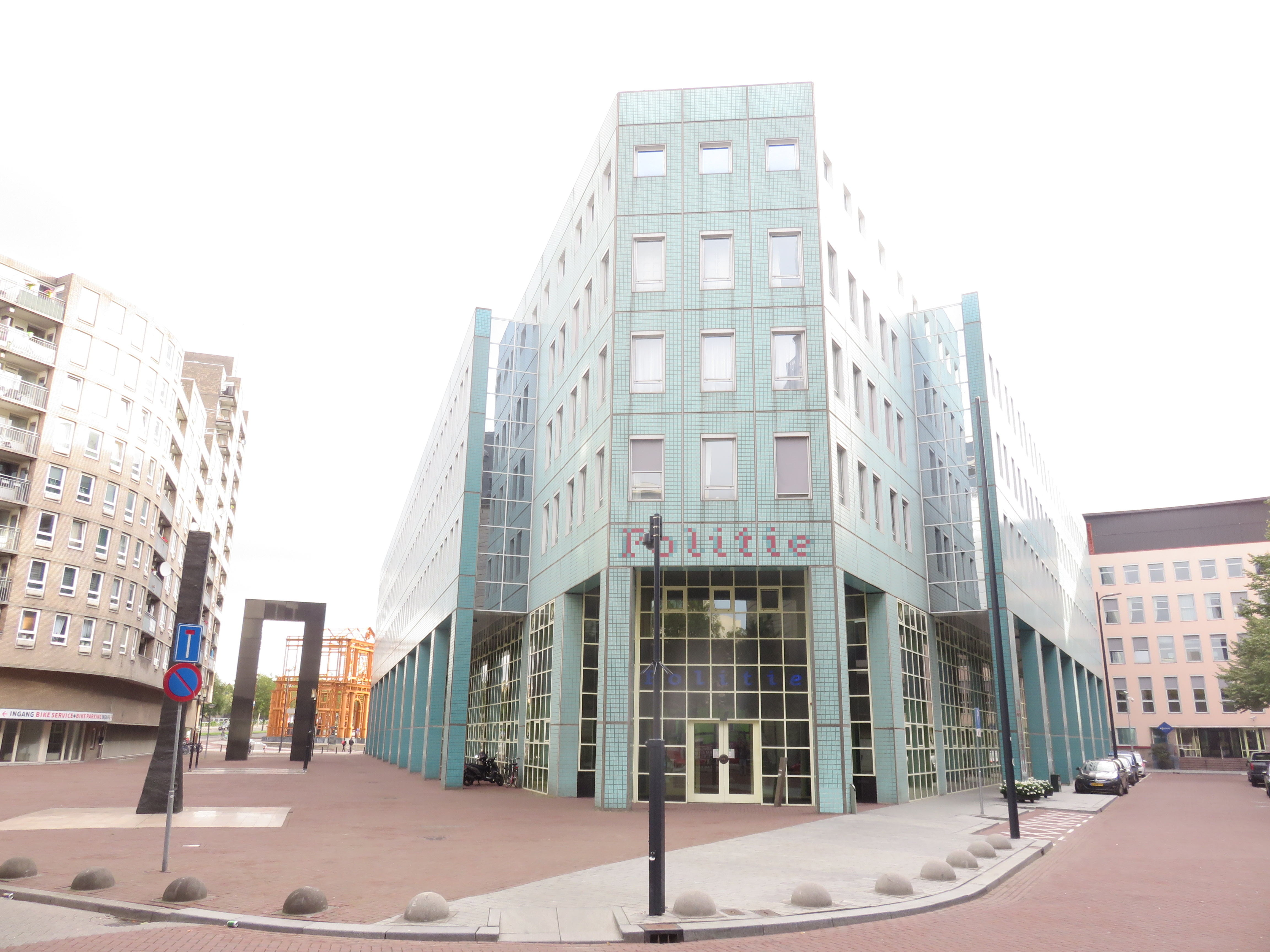 Politie hoofdbureau Rotterdam, 2018